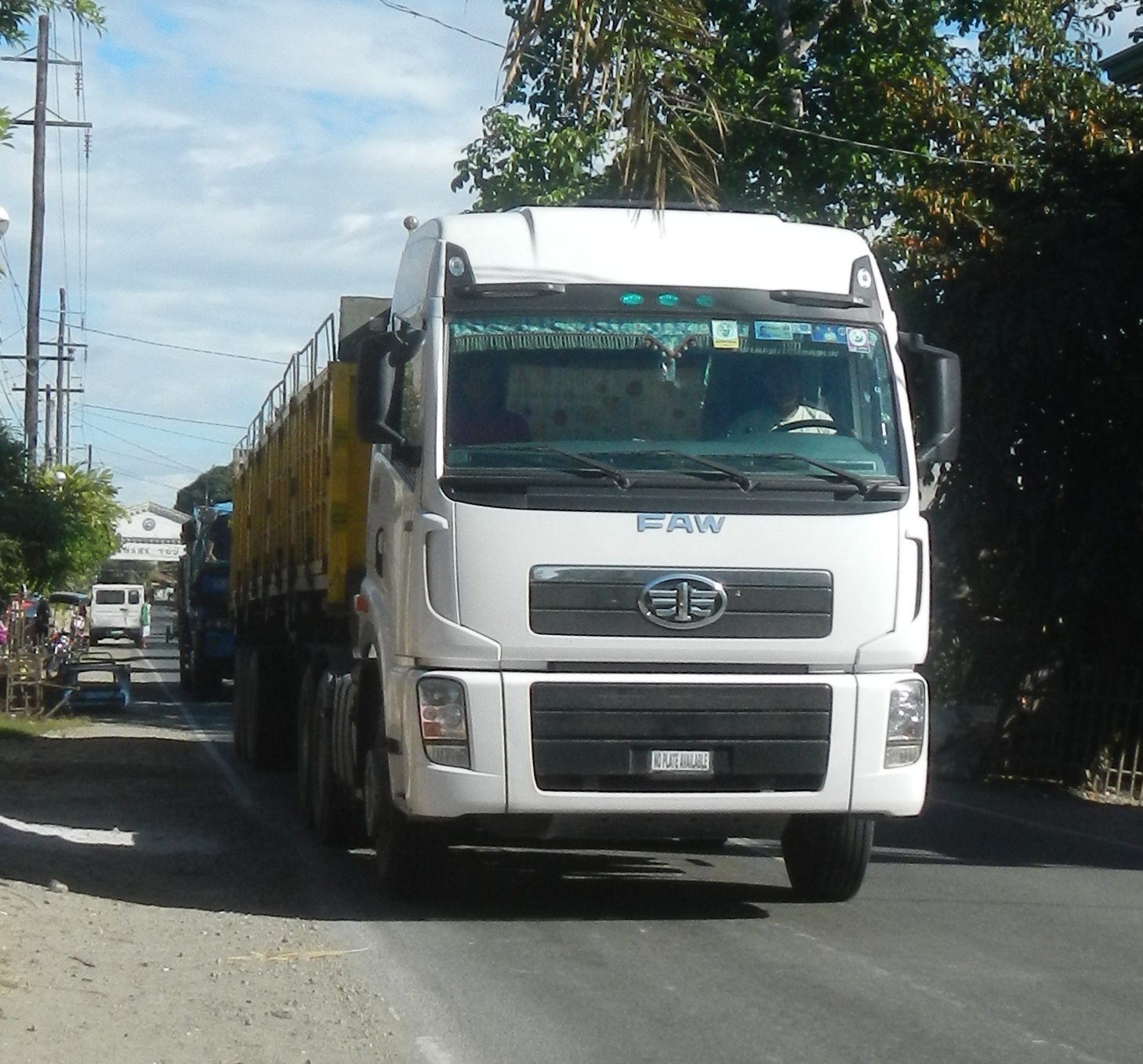 FAW CA4258